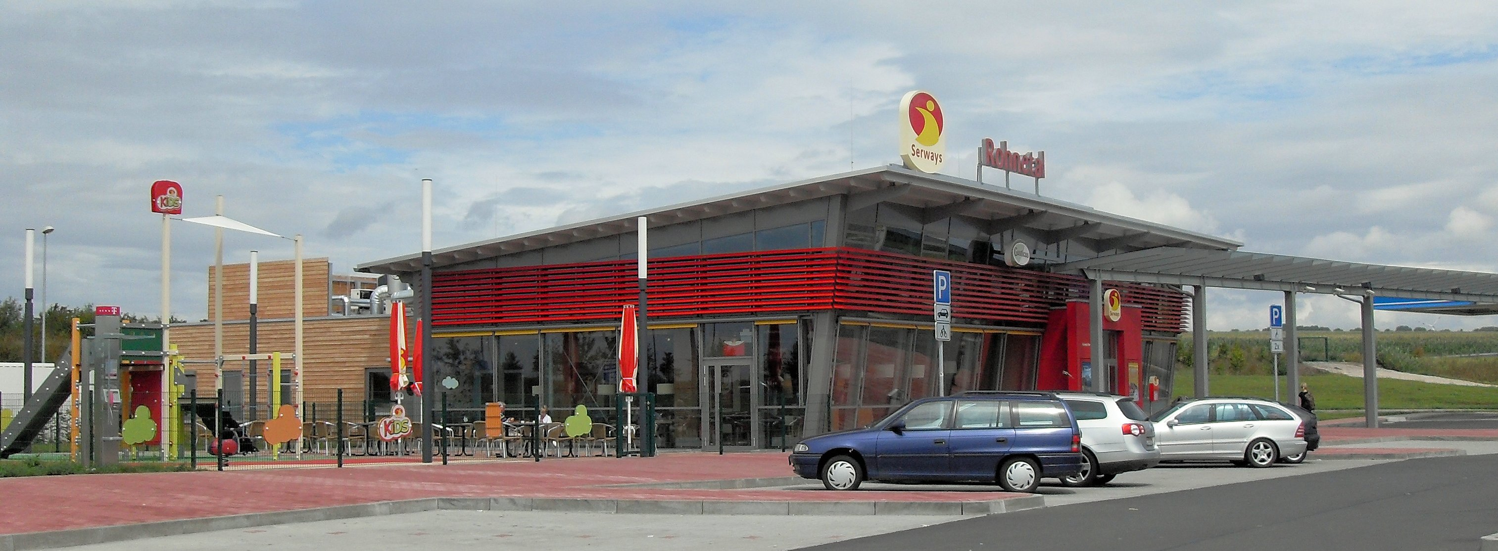 2011 eröffnete Rastanlage «Rohnetal» an der A 38, Ortslage Wolferstedt